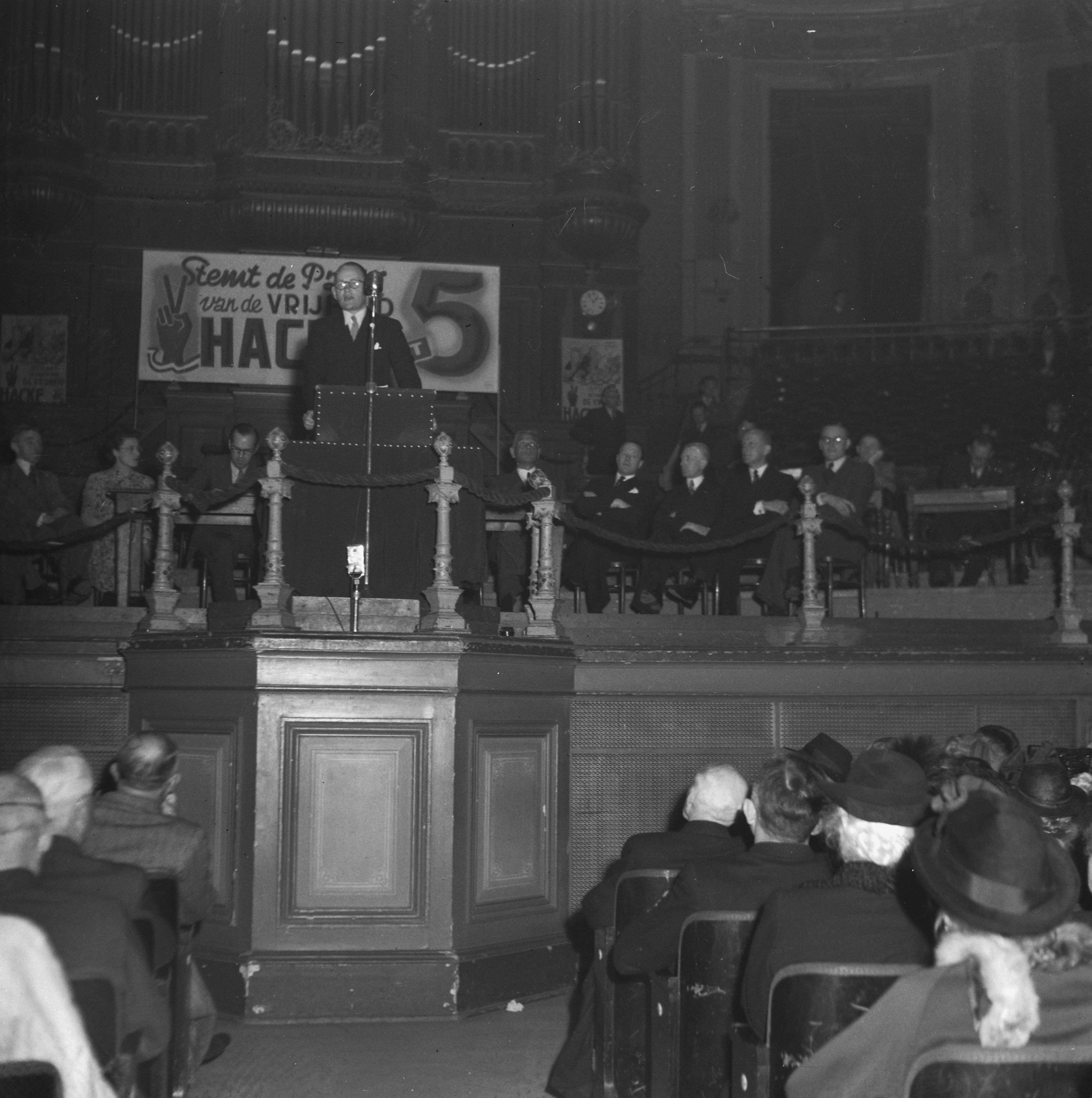 Collectie / Archief : Fotocollectie Anefo Reportage / Serie : [ onbekend ] Beschrijving : Vergaderingen Partij van de Vrijheid Datum : 8 mei 1946 Trefwoorden : VERGADERINGEN Fotograaf : Wisman, Bram / Anefo Auteursrechthebbende : Nationaal Archief Materiaalsoort : Negatief (zwart/wit) Nummer archiefinventaris : bekijk toegang 2.24.01.03 Bestanddeelnummer : 901-7311